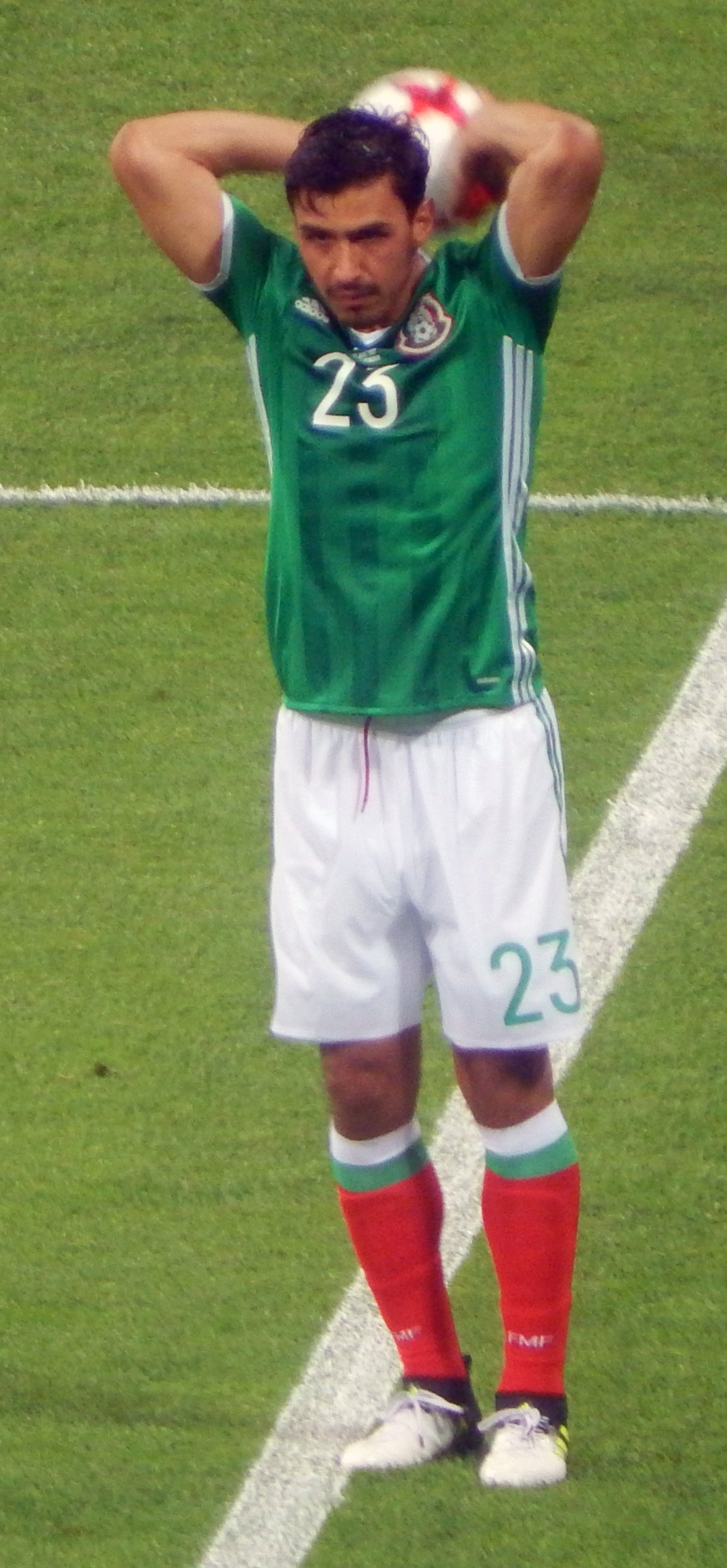 Освальдо Аланис вбрасывает аут